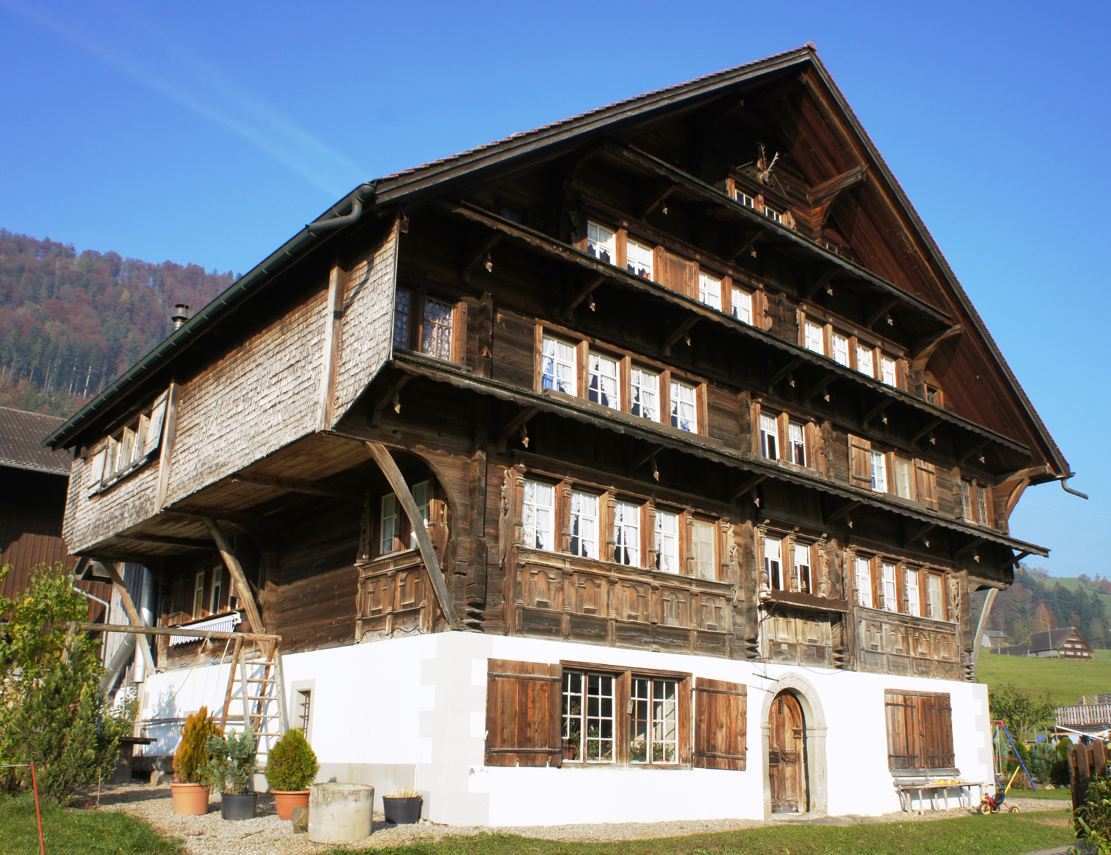 Blick von Südwesten auf das Haus Näf im Weiler Furt, Gemeinde Neckertal. Das Erdgeschoss ist gemauert, der obere Teil ein gestrickter Holzbau. Das Haus hat vier Stockwerke, davon zwei unter dem Dachstock. Die ersten drei Fensterreihen sind mit einer Schindel-Simse überdacht. Das zweite Stockwerk ist auf der West- und Ostseite bis unter das Vordach ausgebaut. Dieser Teil ist auf der Aussenseite mit Holzschindeln beschlagen. Unter dem Giebel prangt ein Hirschgeweih. Der Eingang im Erdgeschoss hat einen Bogensturz. Das Kellergeschoss ist weiss verputzt, das Holz im oberen Teil ist naturbelassen dunkelbraun.